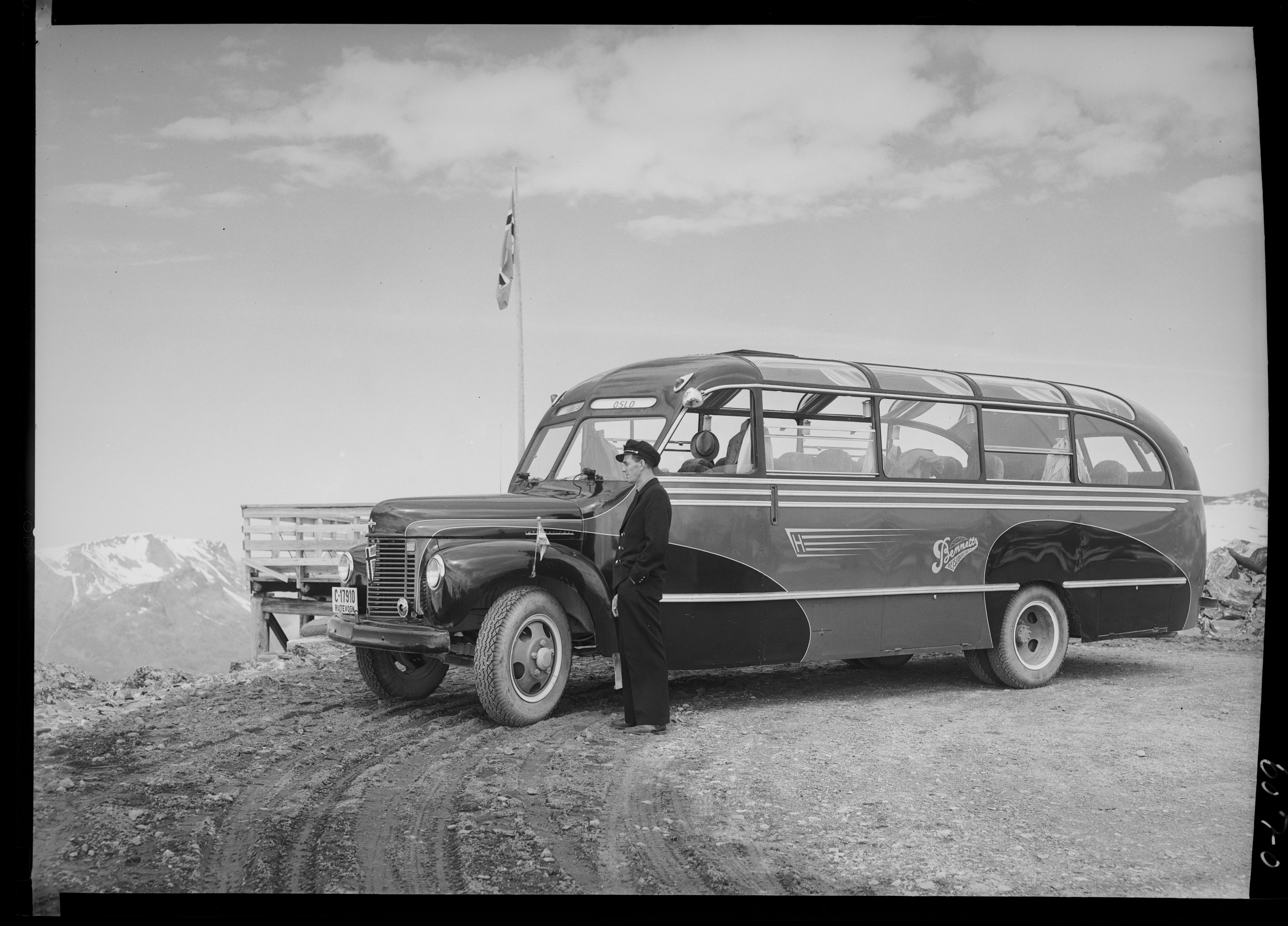 Bildet er hentet fra Nasjonalbibliotekets bildesamling. Anmerkninger til bildet var: Fotograf:Ukjent Dalsnibba, Stranda, Møre og Romsdal